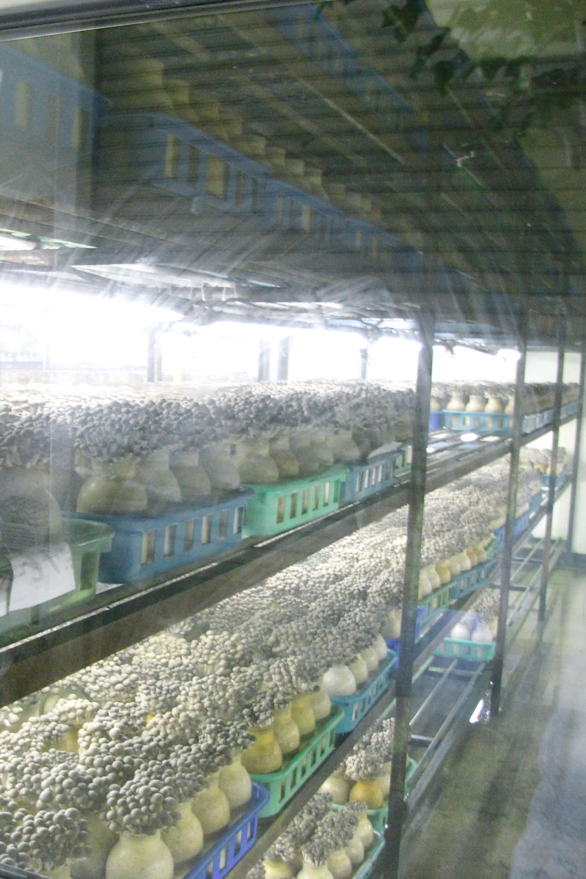 10/20にきのこを食べに長野県上田の「きのこむら深山」に行ってきました。 これはその中のきのこ工場。しめじをここで生産してレストランですぐに食べられる。